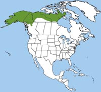 En la fotografia es mostra la distribució geogràfica del suslic àrtic.